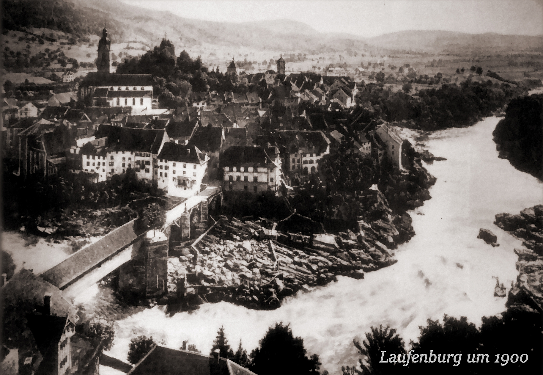 Von einem öffentlichen Foto abfotografiert, Laufenburg um 1900